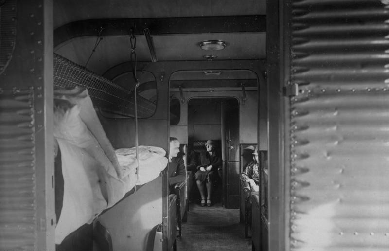 Der comfortabelste Schlafwagen der Luft! Durchblick durch die comfortablen Kabienen des Schlafwagen-Flugzeuges für Tag-und Nacht-Zeit eingerichtet, während des Fluges.